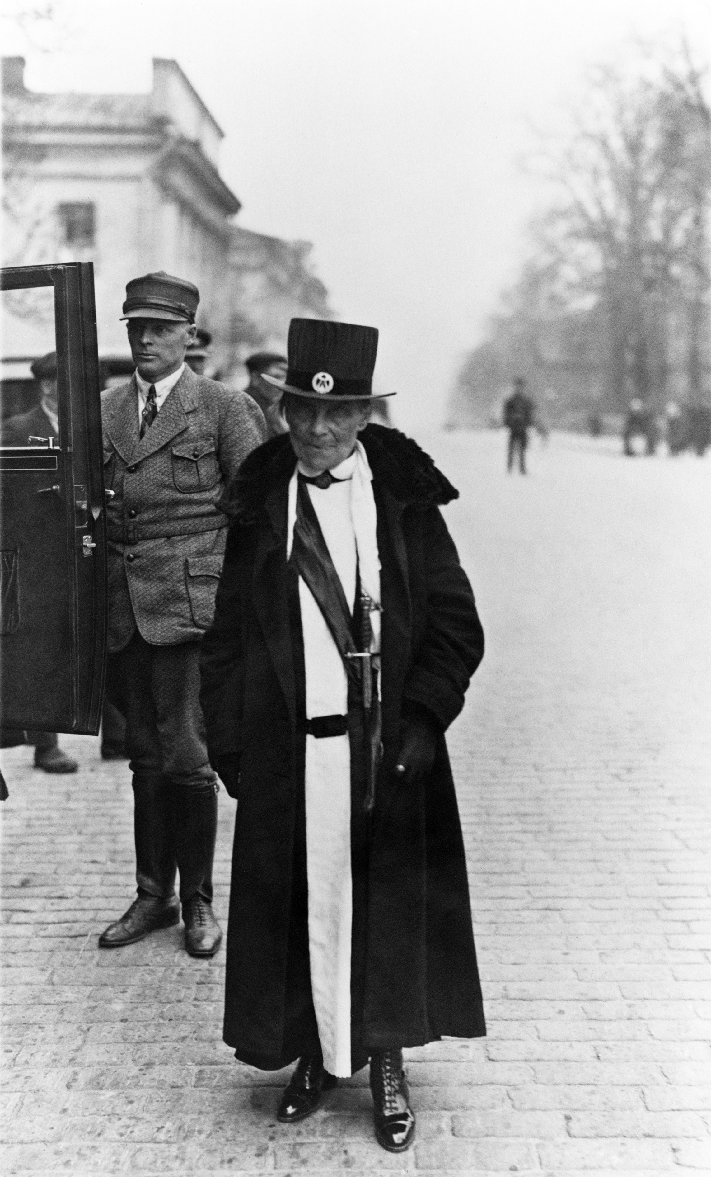 Emma Irene Åström (1847–1934), Suomen ensimmäinen naismaisteri, kunniatohtoriksi vihittynä Helsingin yliopiston Filosofisen tiedekunnan promootiossa 1927; vedos, paperi, mv